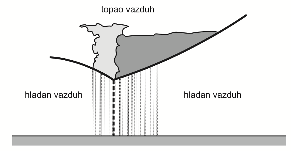 Српски (ћирилица): Неутрални фронт оклузије